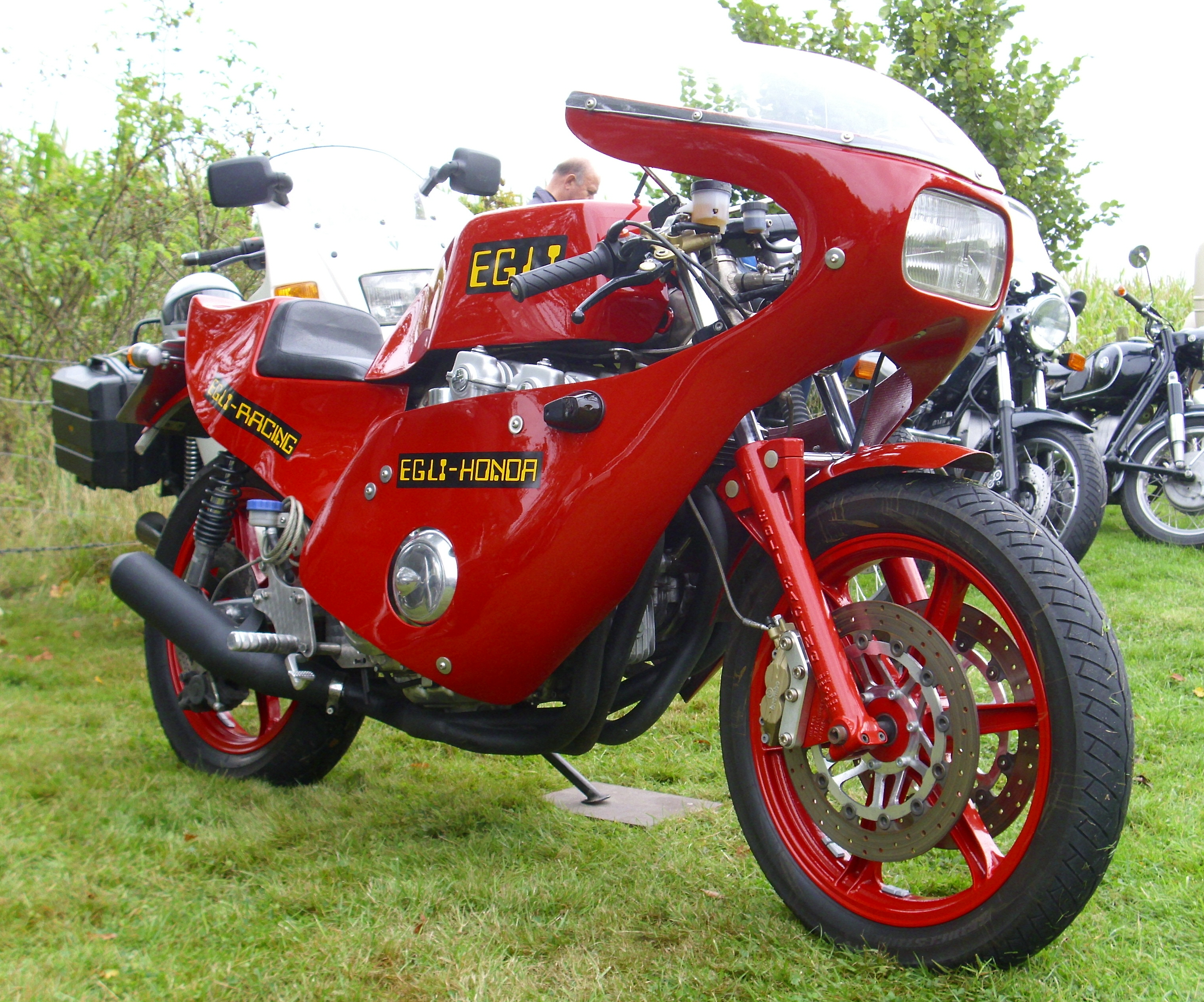 Egli-Honda (Honda CB750) beim Oldtimertreffen auf dem Gelände des Speichenmuseum in Klein Offenseth-Sparrieshoop